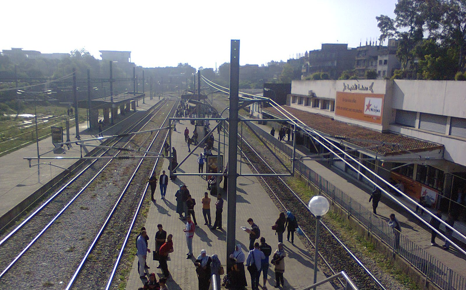 La gare ferroviaire de la ville de Thenia, Boumerdès